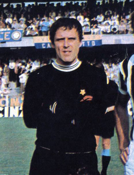 Verona, stadio Marcantonio Bentegodi, 11 ottobre 1970. Il portiere di calcio italiano Roberto Tancredi alla Juventus, prima dell'inizio della sfida sul campo del Verona (0-0) valevole per la 3ª giornata del campionato italiano di Serie A 1970-71.